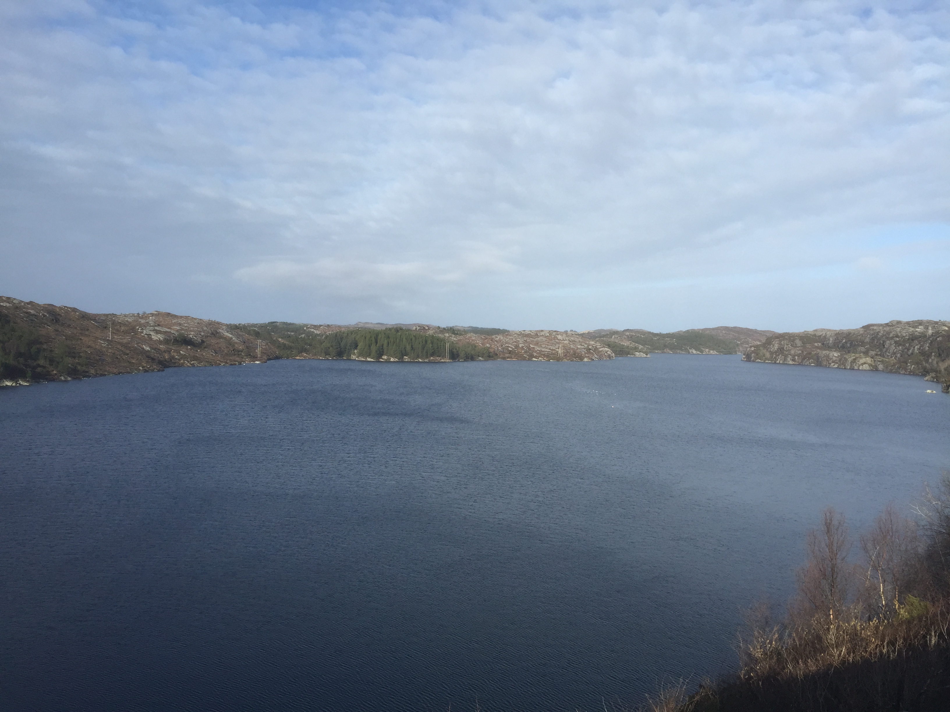 Kørelen, innsjø i Sund kommune